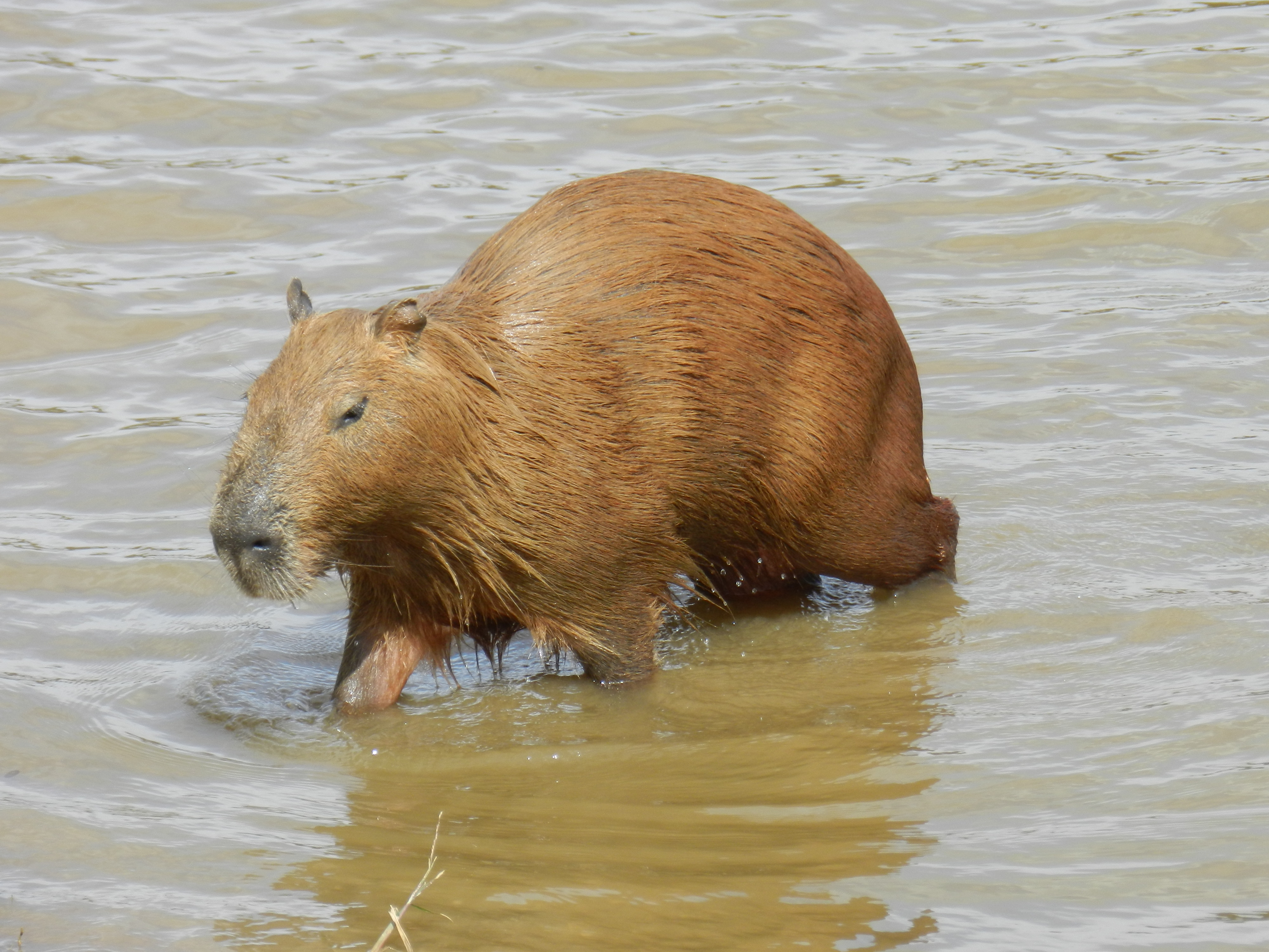 Capivara tomando banho na lagoa.